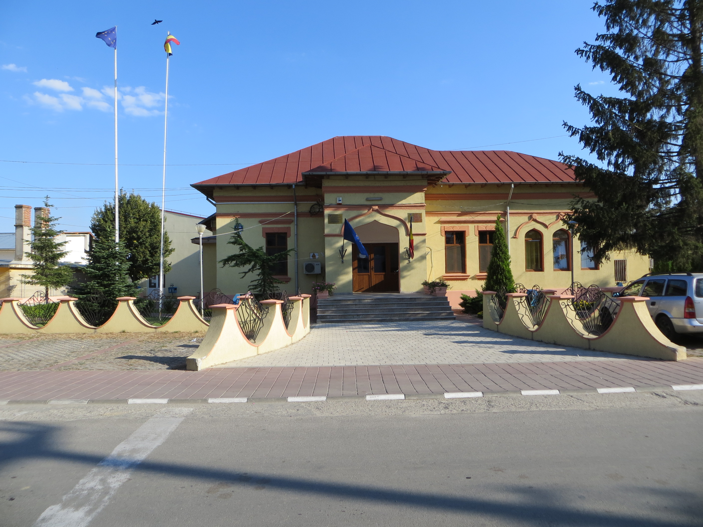 Pretura, azi Primăria